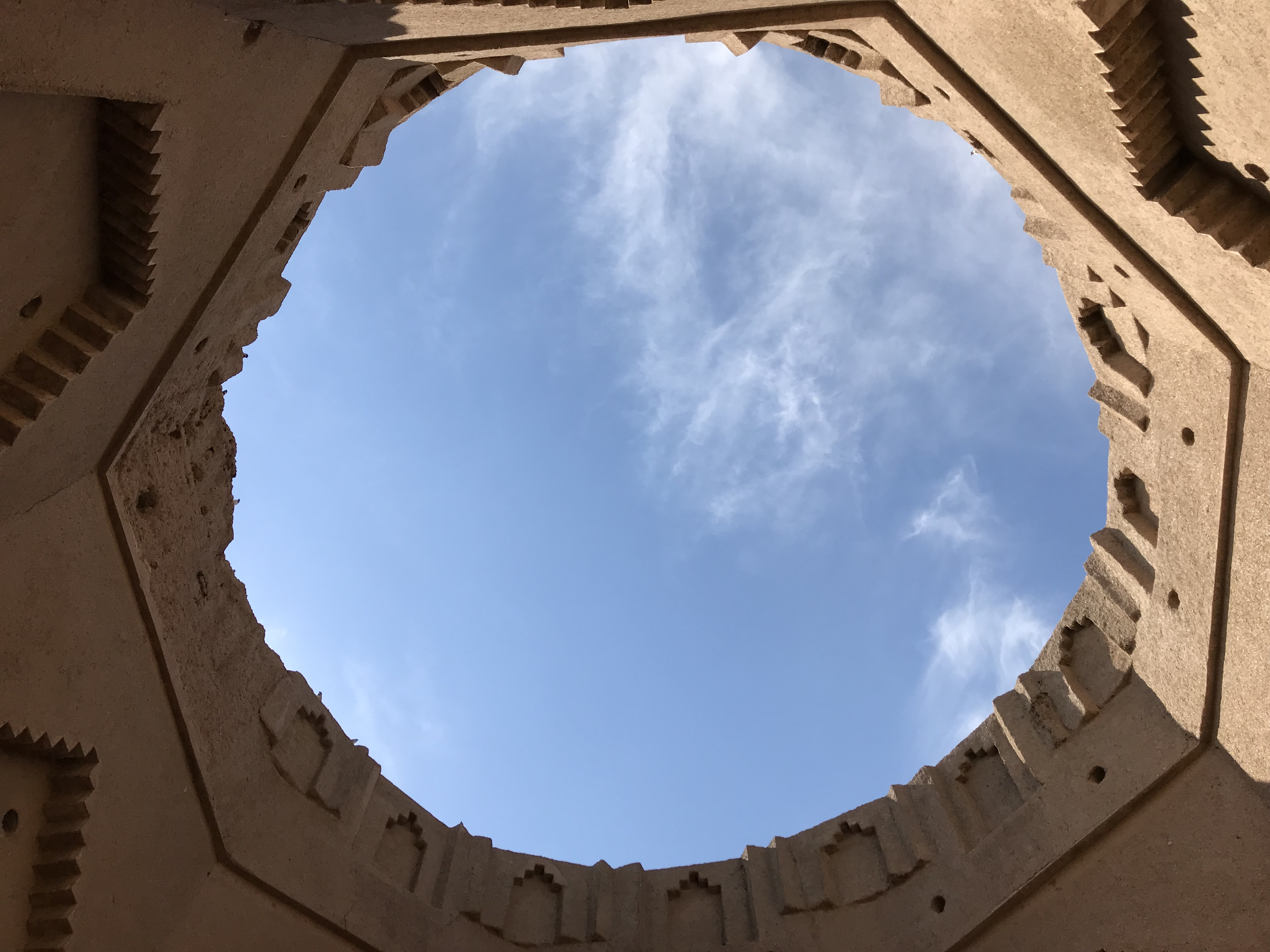 نمایی دیگر از داخل برج چهل دختر سمنان